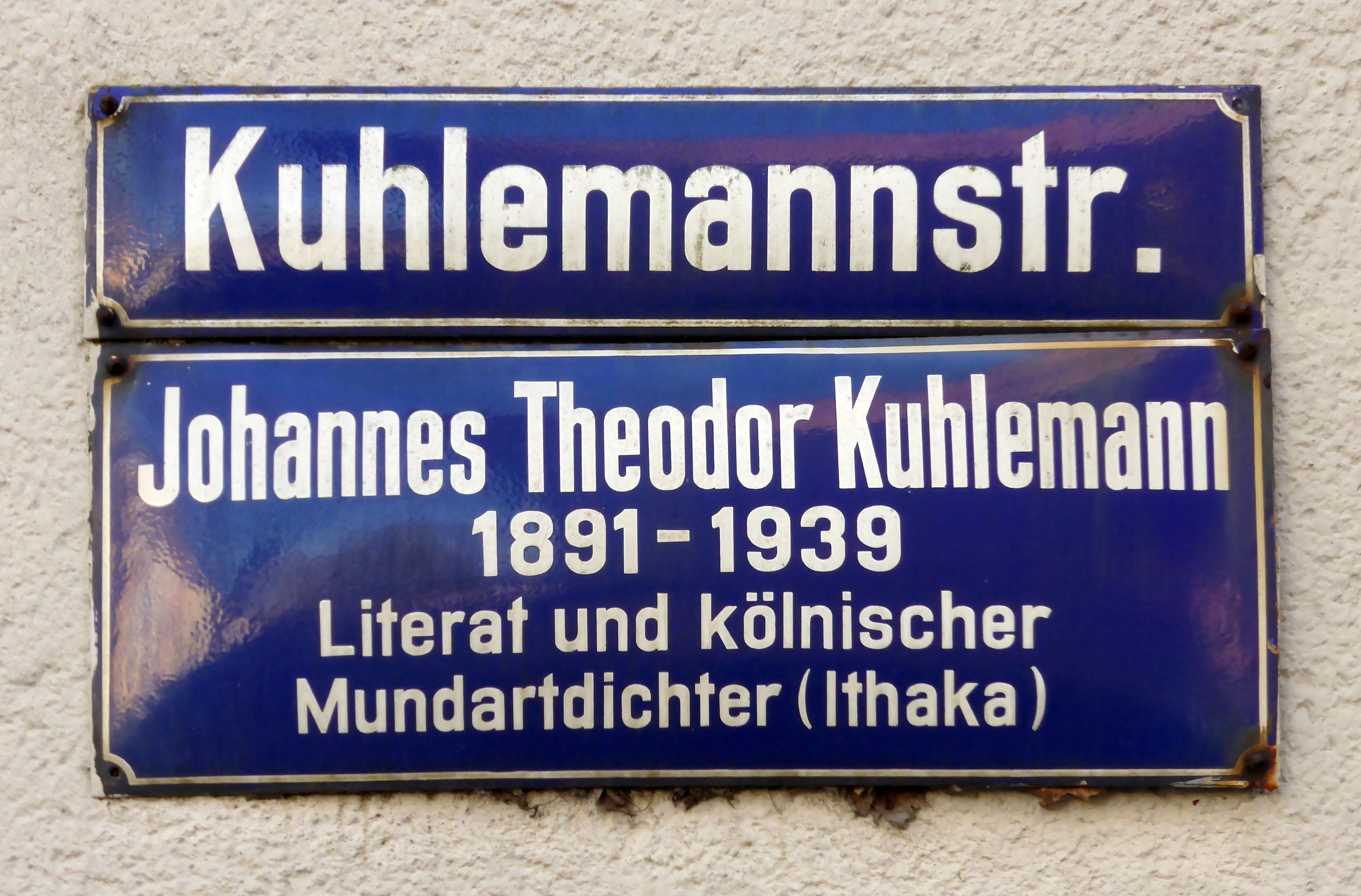 Straßenschild zum Gedenken an Johannes Theodor Kuhlemann